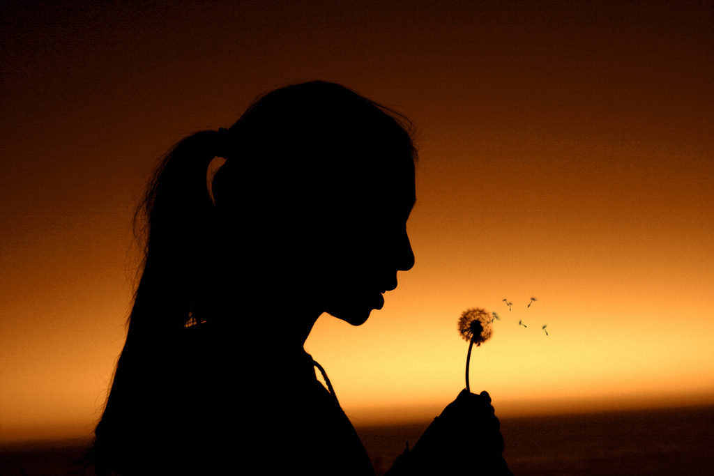 Wish